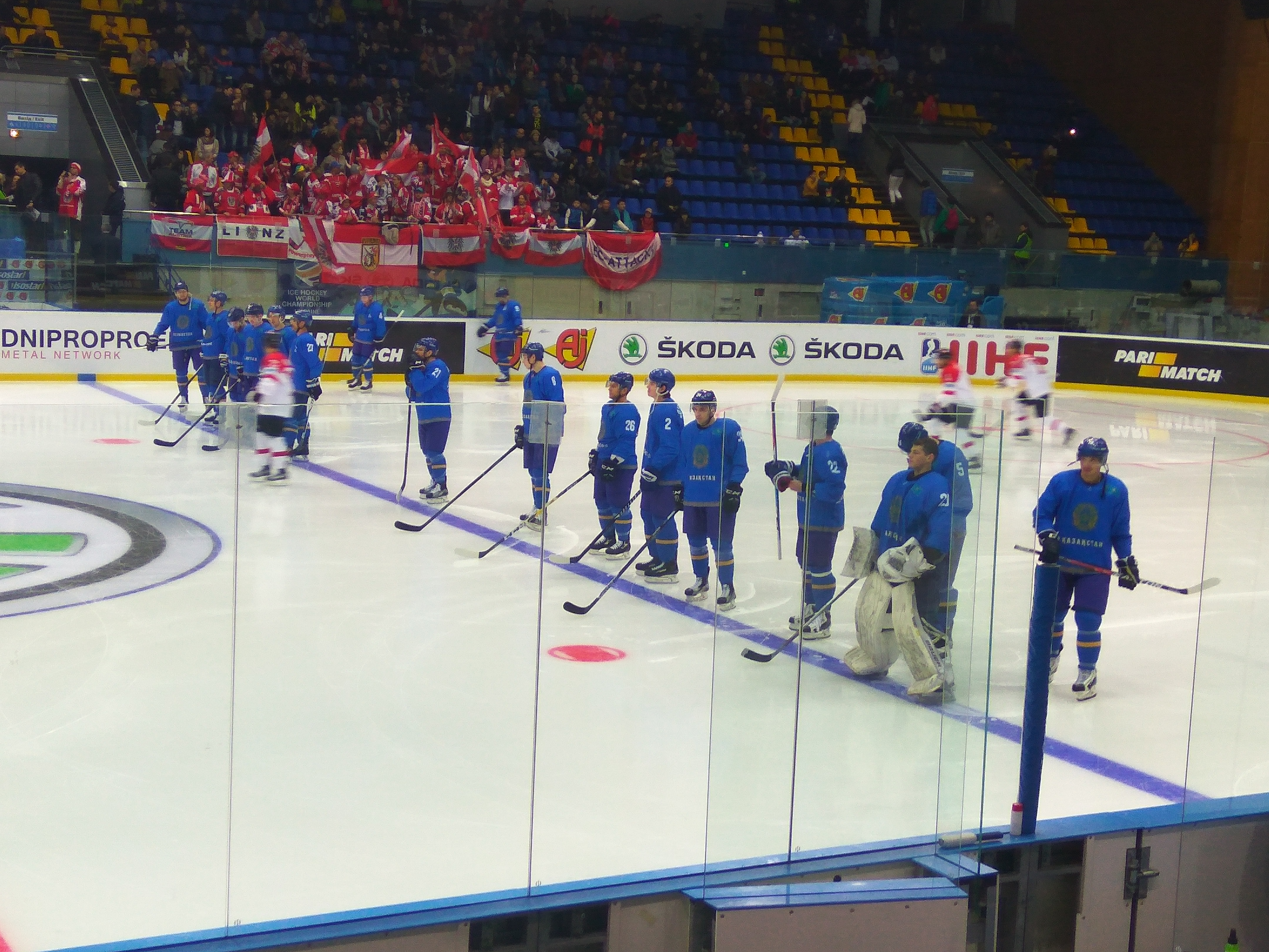 Чемпіонат світу з хокею 2017 у першому дивізіоні. Казахстан-Австрія